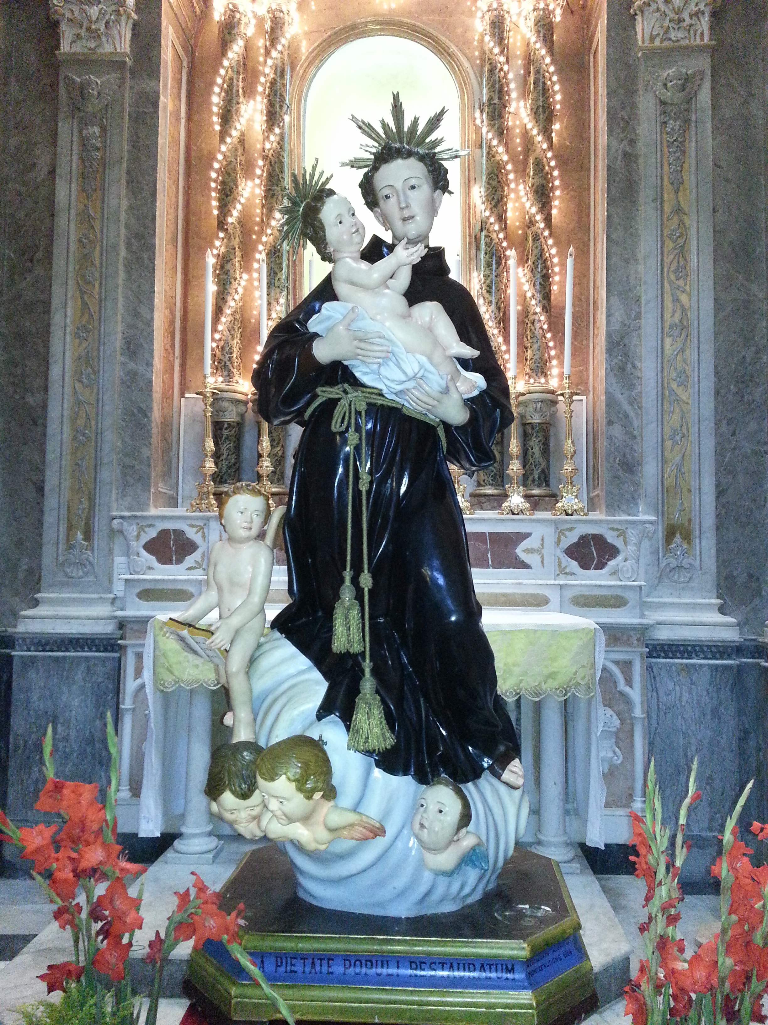 Statua di Sant'Antonio di Padova venerato in Montefalcione (Avellino)